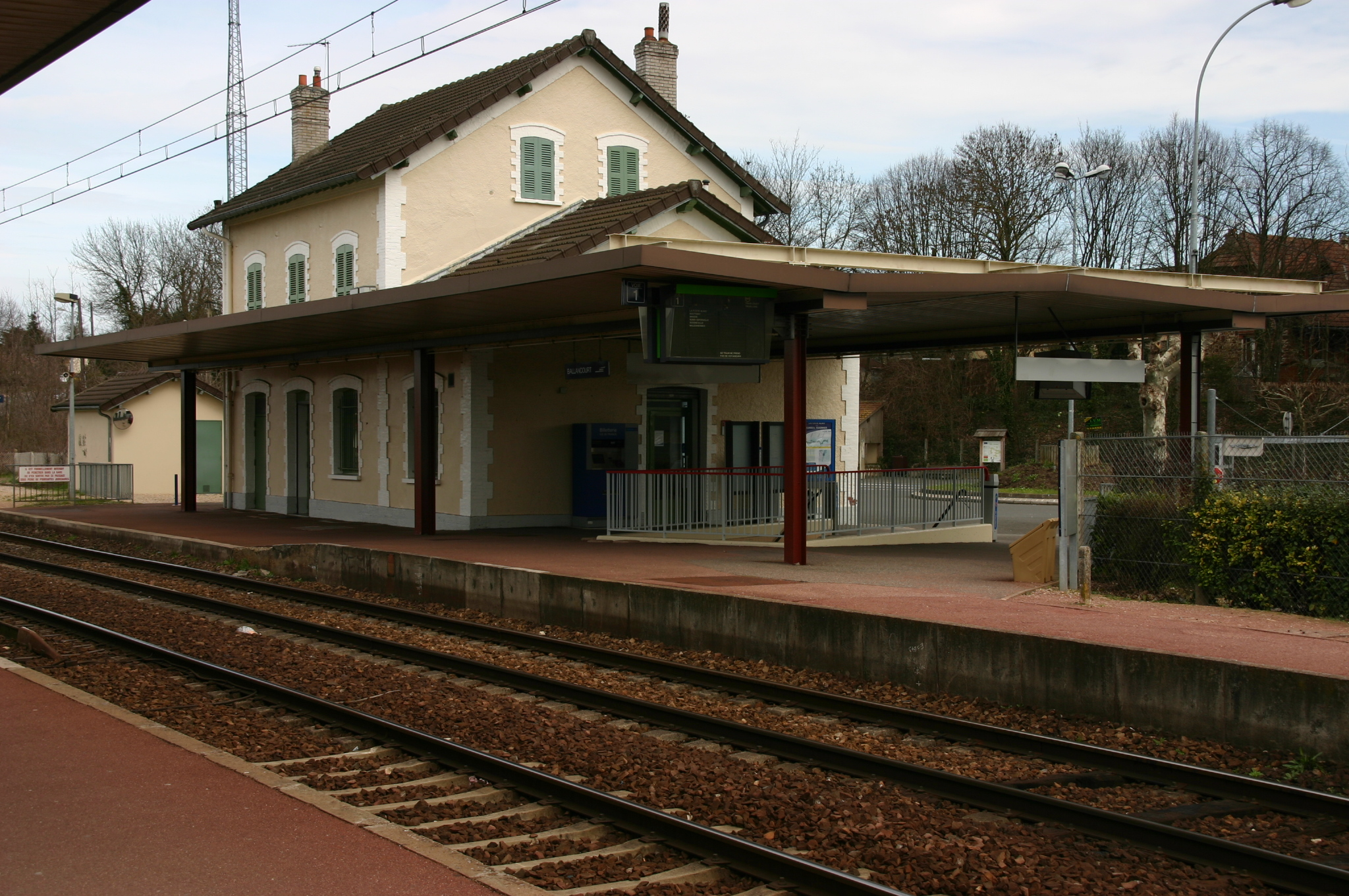 La gare de Ballancourt, Ballancourt, département de l'Essonne (France)